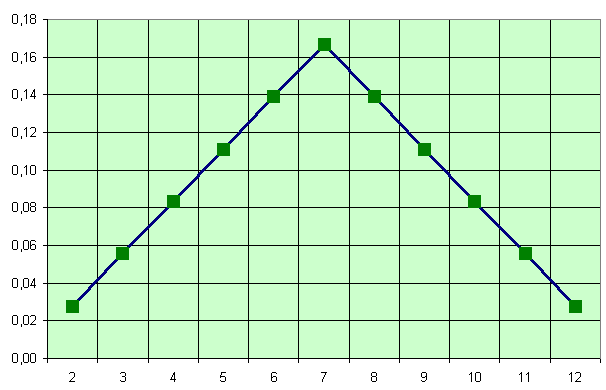 Dice Distribituion